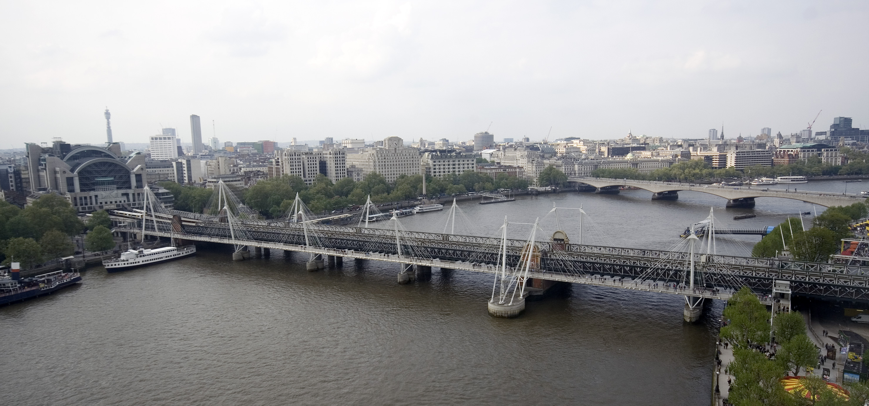 Hungerford Bridge from London Eye